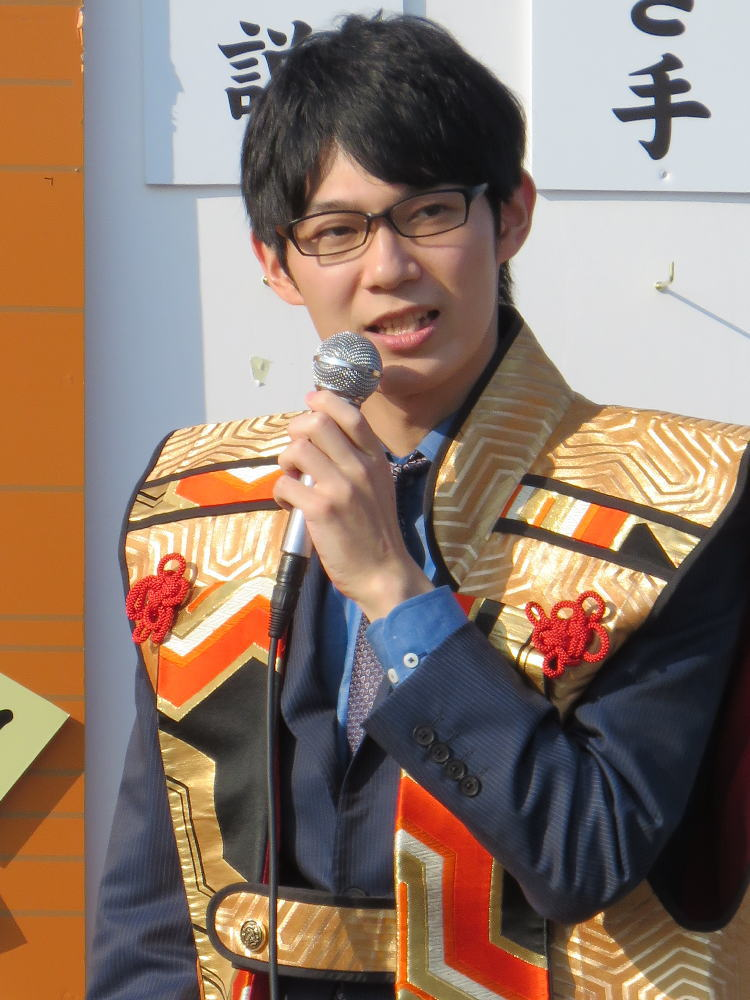 将棋棋士の斎藤慎太郎（平成２９年１１月、姫路市で行われた人間将棋にて）